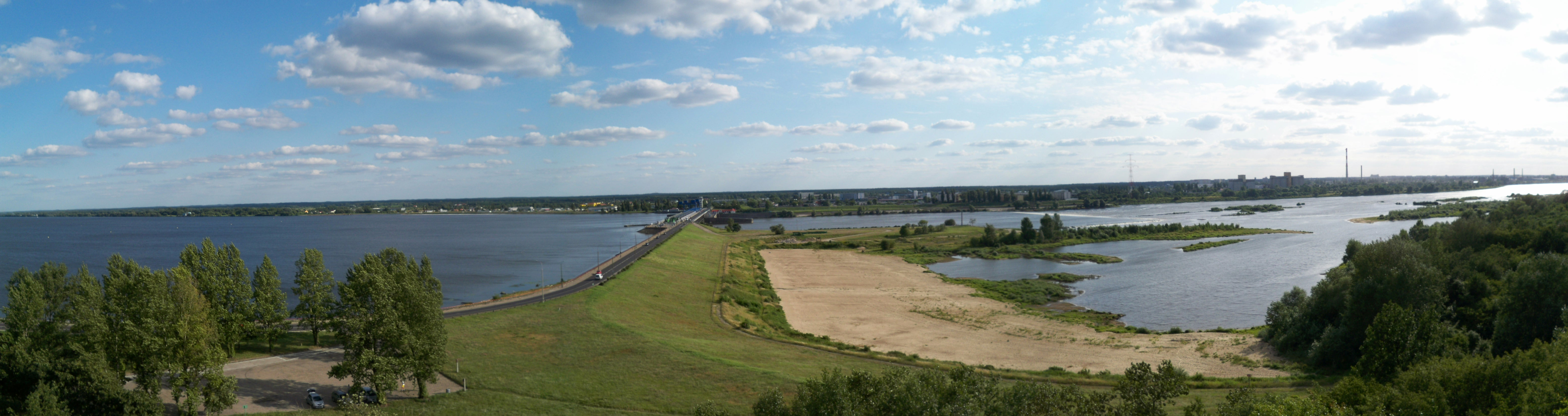 Stopień wodny na Wiśle we Włocławku (2009 r.)